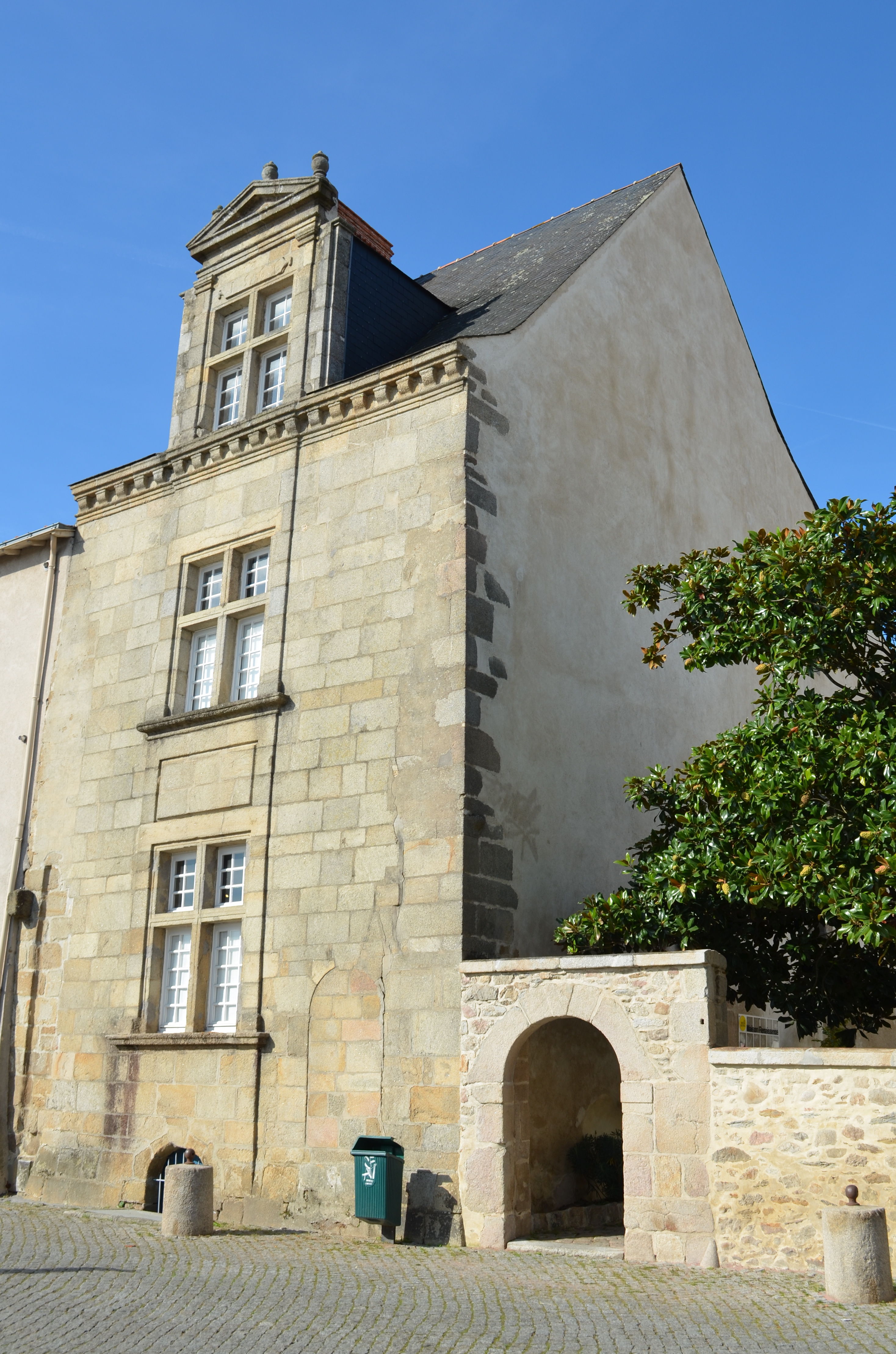 Pavillon Renaissance - Place de la Vieille-Horloge, La Roche-sur-Yon .